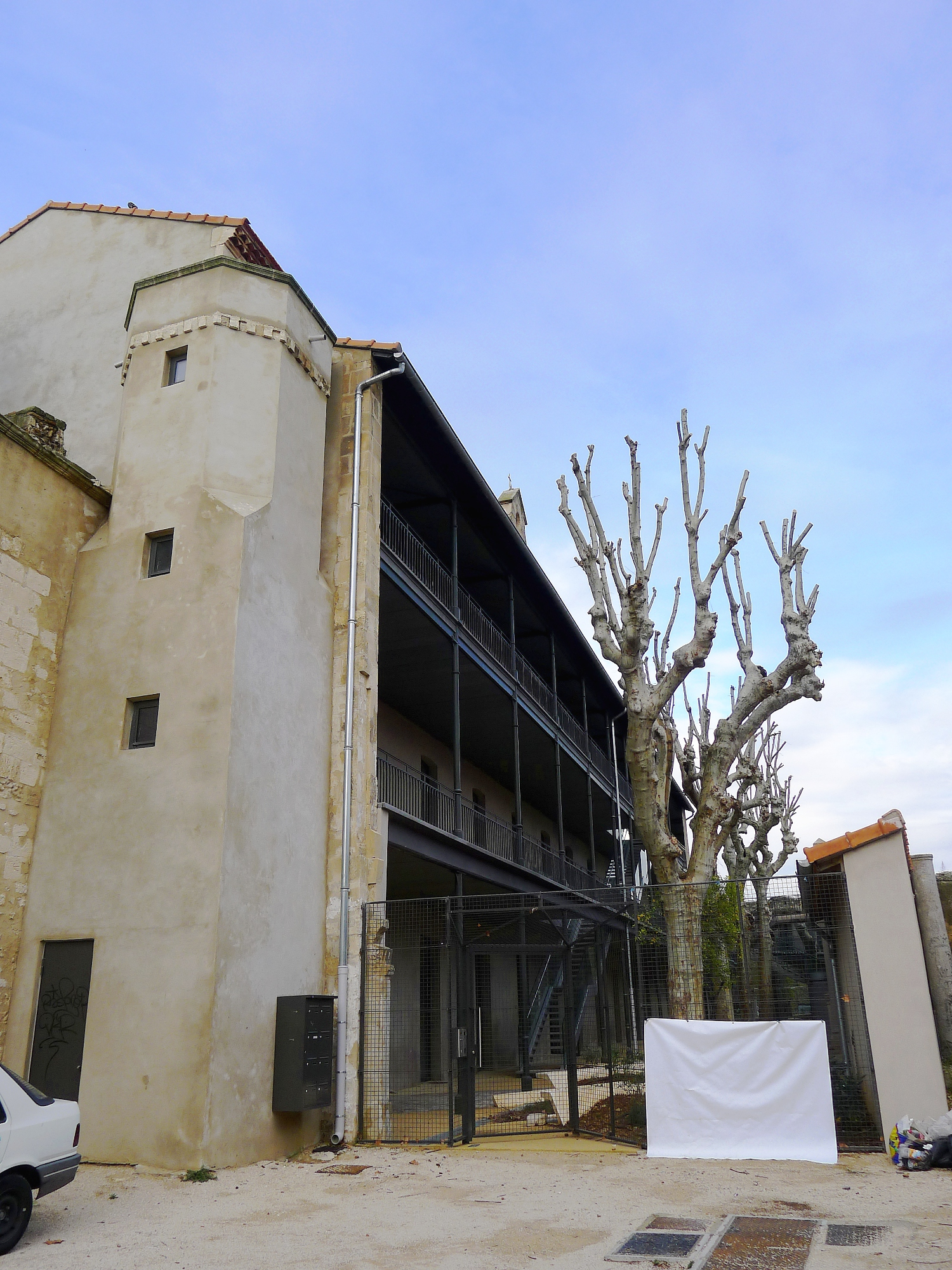 Enclos Saint-Césaire à Arles (France), ancien hospice Saint-Césaire réhabilité en bâtiment administratif